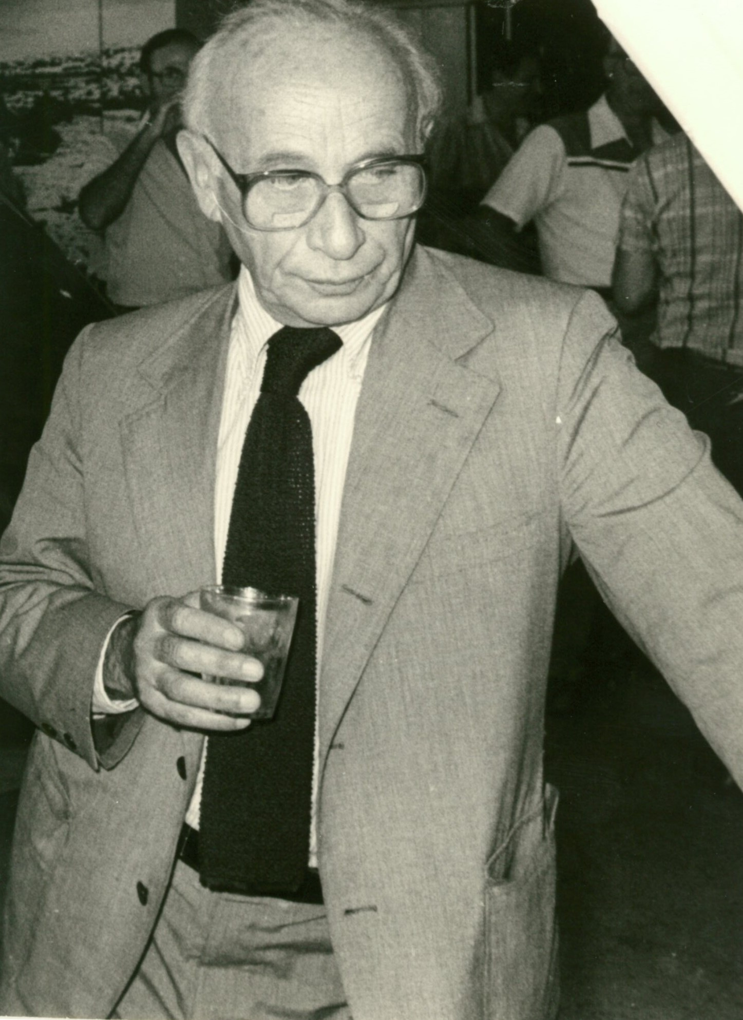 יוסף (ג׳ו) בוקסנבאום